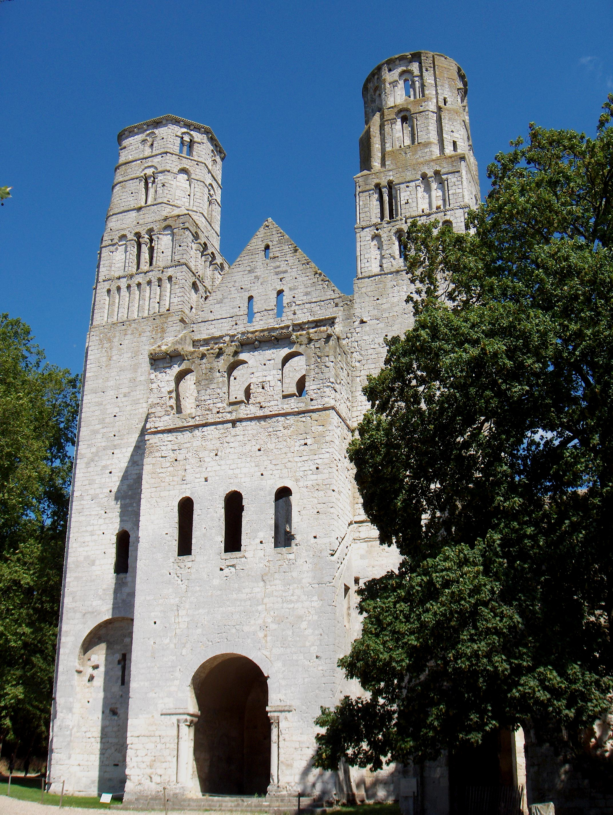 Abtei von Jumièges (Frankreich, Dept. Seine-Maritime), Ruine. Westwerk der Abteikirche, 11. Jh.